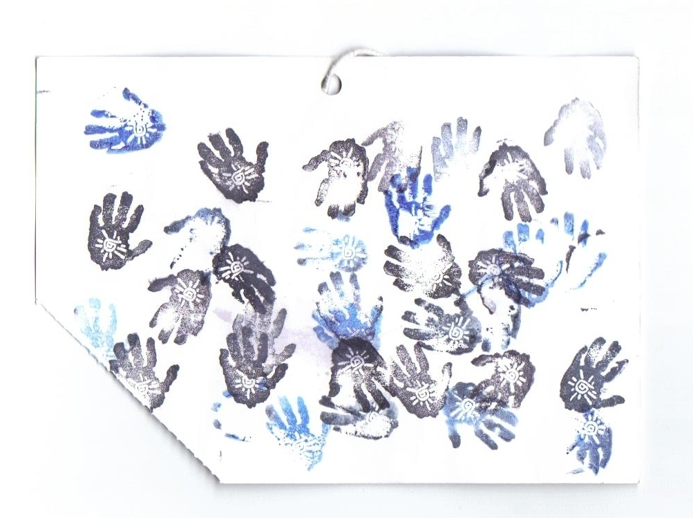 Stempelkarte (35 Runden) des 9. Österreichischen Friedenslaufes.